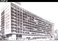 Fachada del edificio del Mercado del Plata, Buenos Aires.